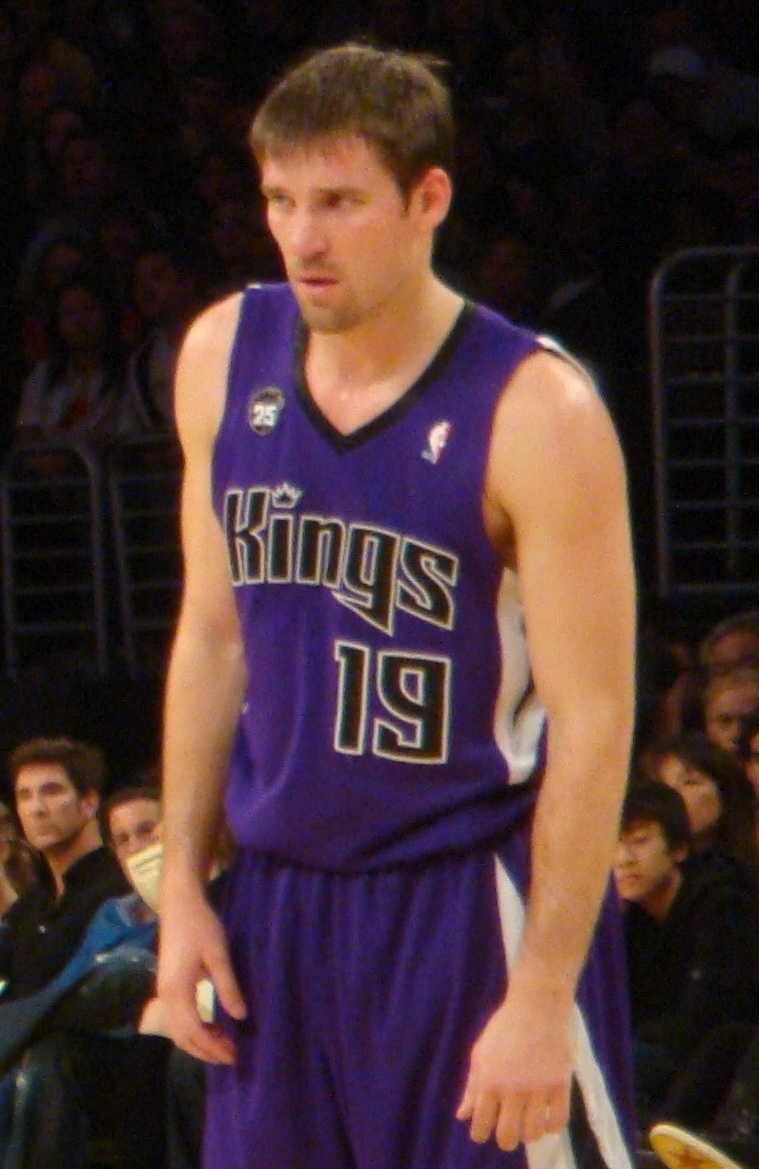 Beno Udrih cropped